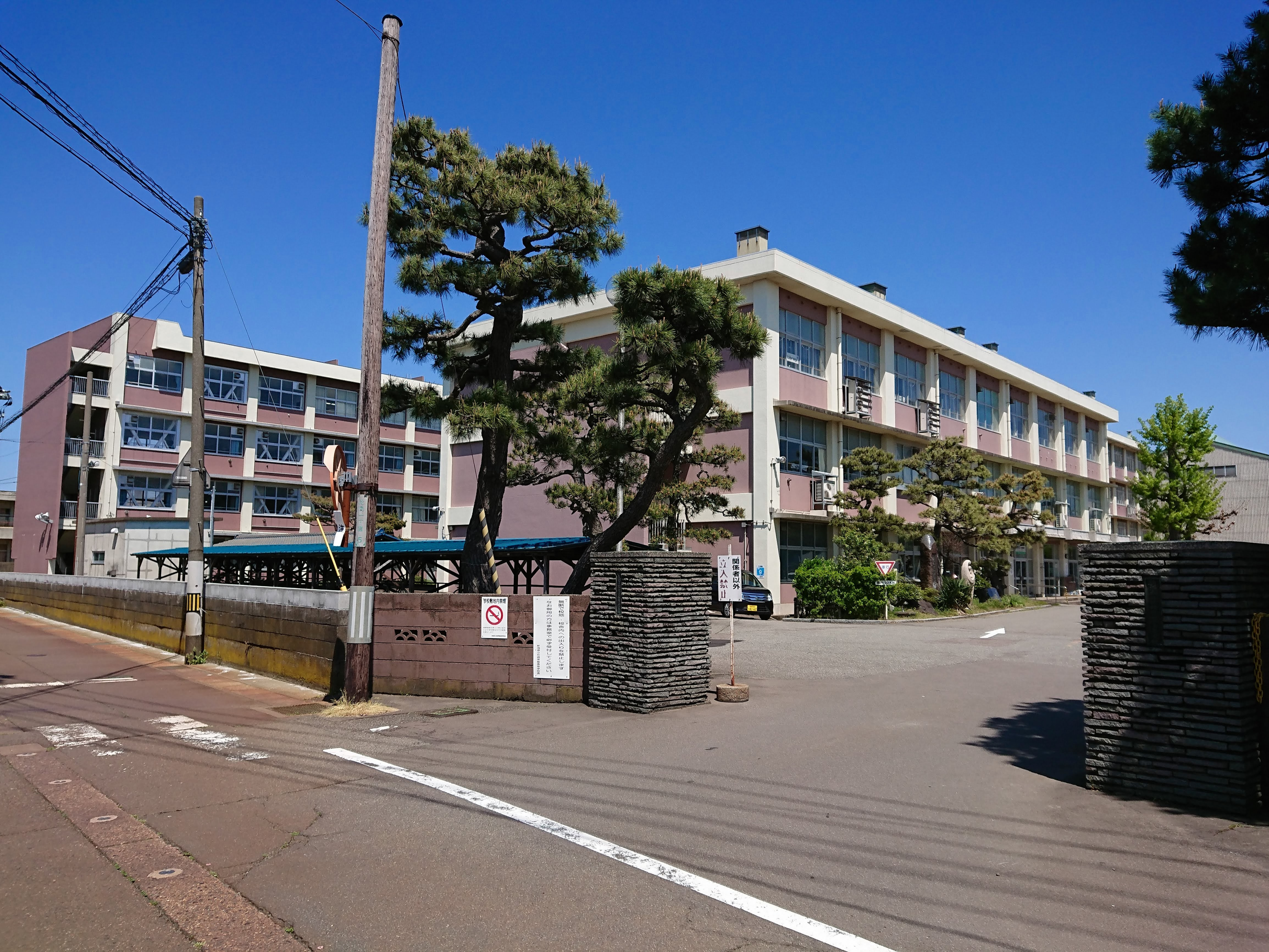 新潟県立柏崎常盤高等学校の校舎